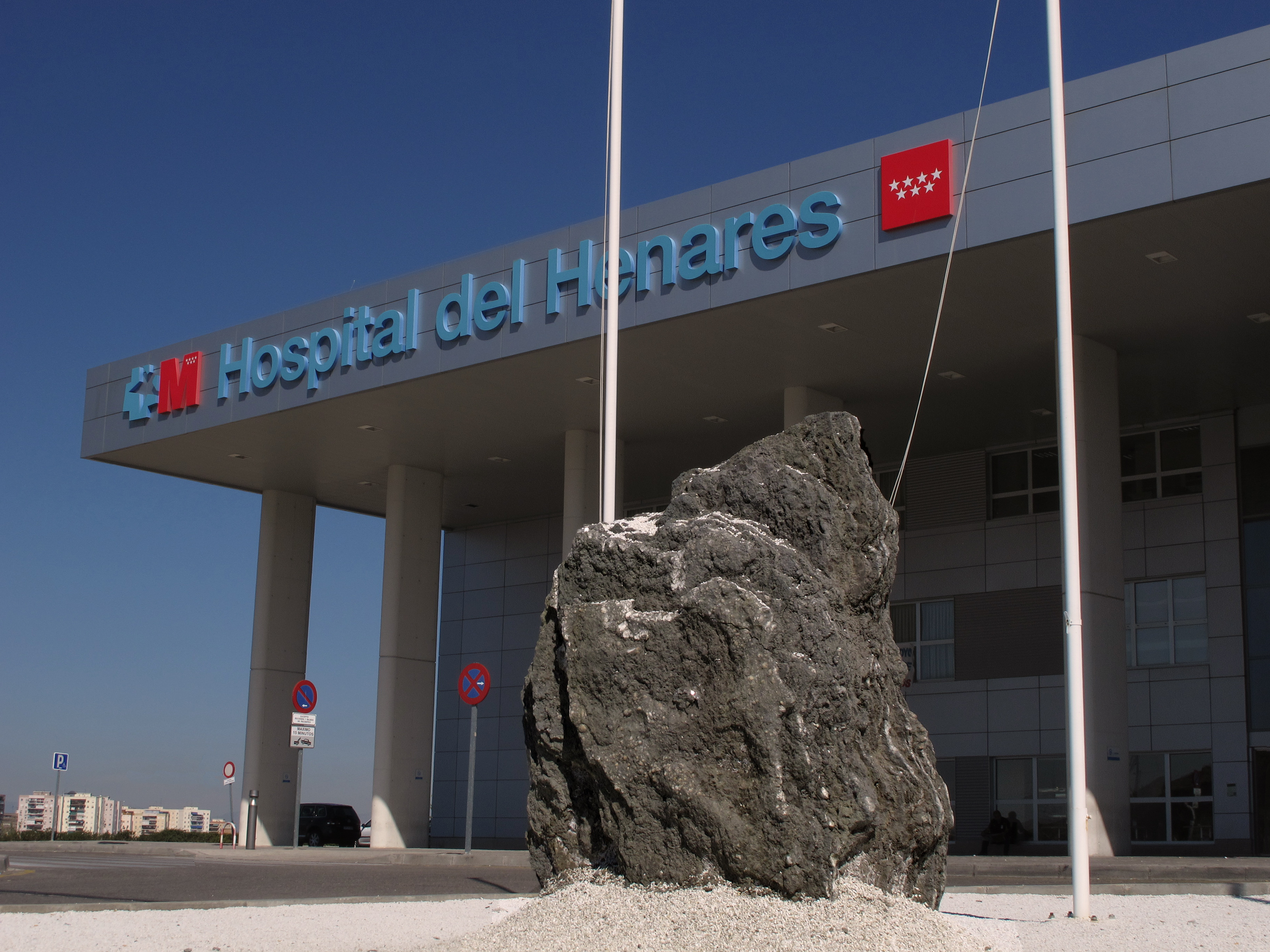 Roca de yeso laminar y nodular en la entrada del Hospital del Henares (Coslada, Comunidad de Madrid, España).